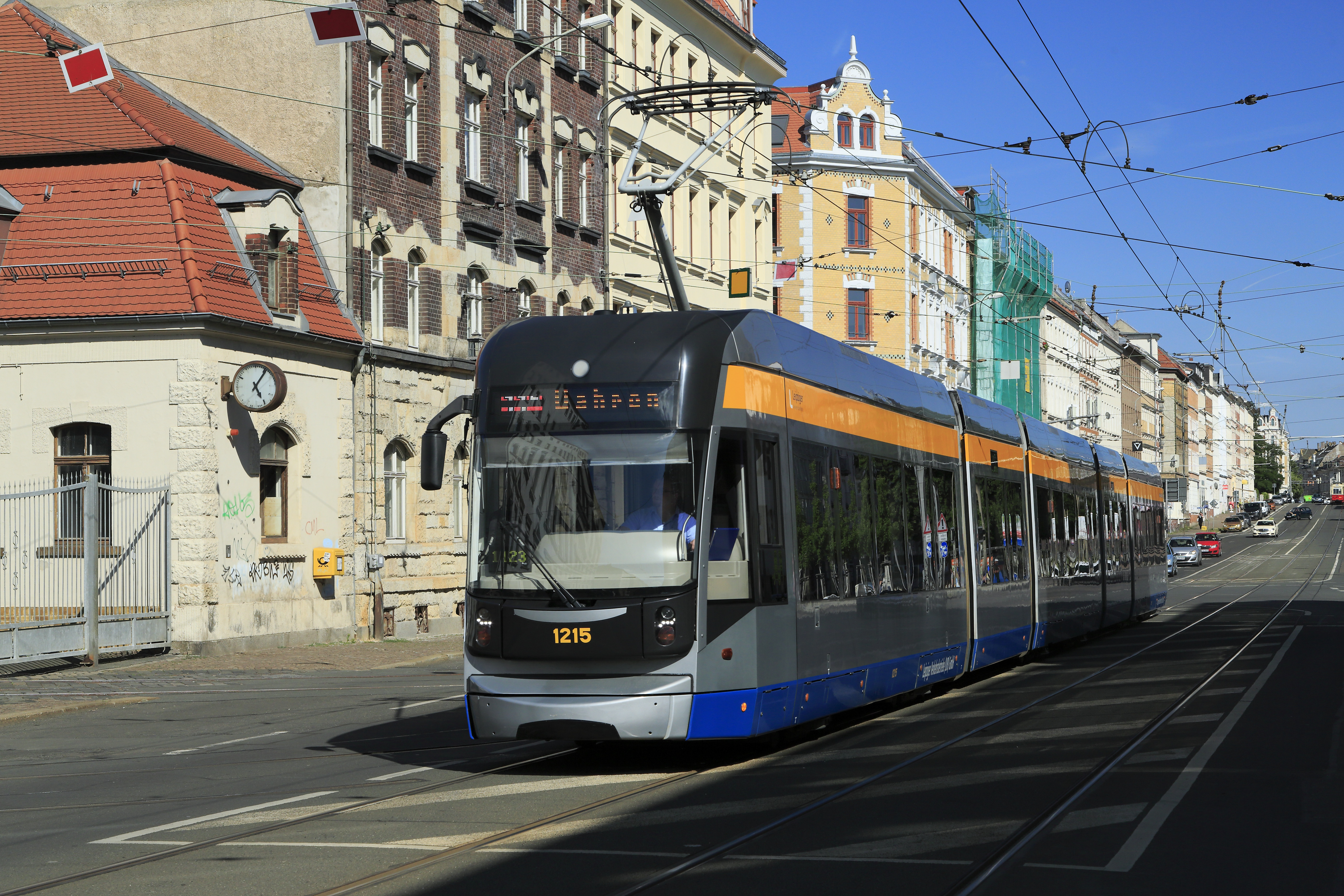 Gelenkwagen Typ 38 (NGT12-LEI), Linie 11E Richtung Wahren auf der Georg-Schumann-Straße vor dem Straßenbahnmuseums-Bw Möckern.Die Sh-2-Scheiben im Kettenwerk sind eine Folge der ausgebauten Weichen.